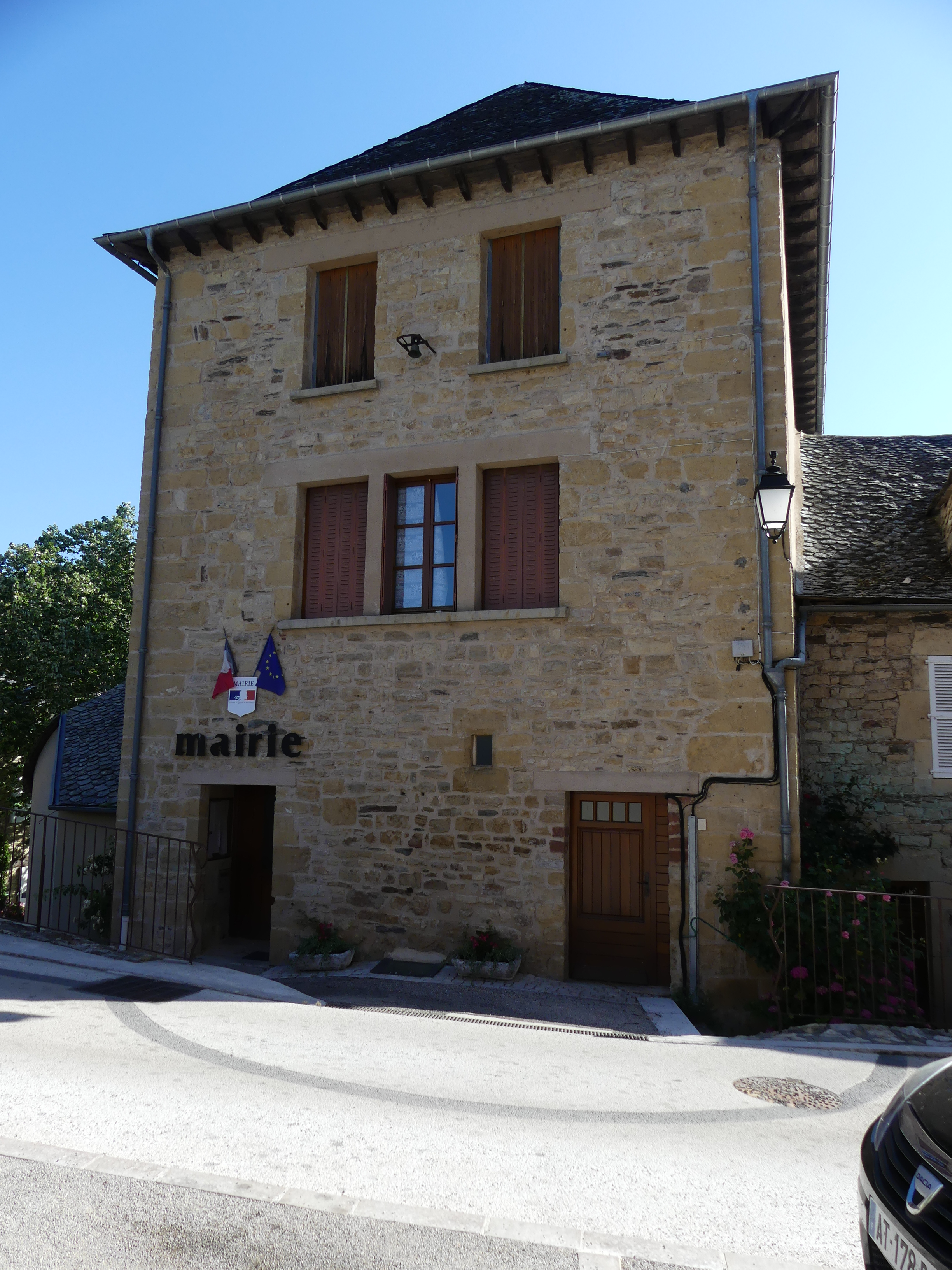 La mairie de Coubisou, Aveyron, France.